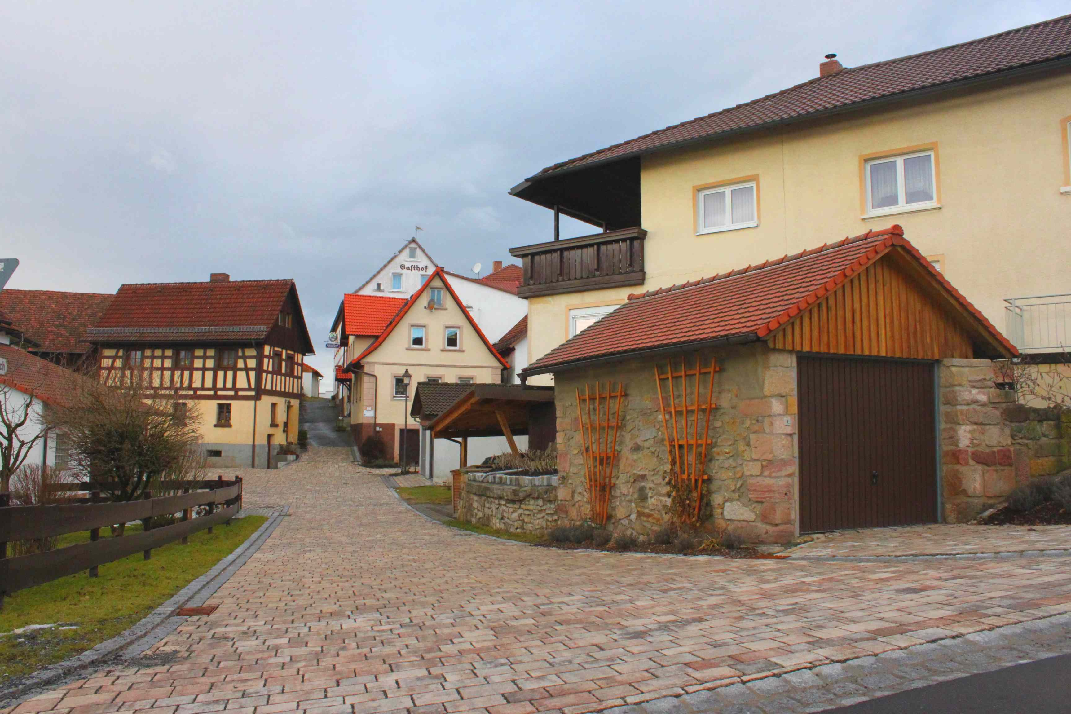 In der Ortsmitte von Ludwigschorgast